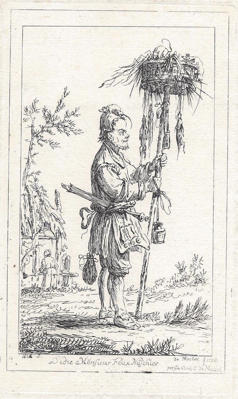 Der Rattengiftverkäufer, Radierung von Christian von Mechel nach Georg Wille 1788: Dedié à Monsieur Felix Nuschler (Felix Nüscheler) par son Ami C. de Mechel, de Mechel f(ecit) 1788